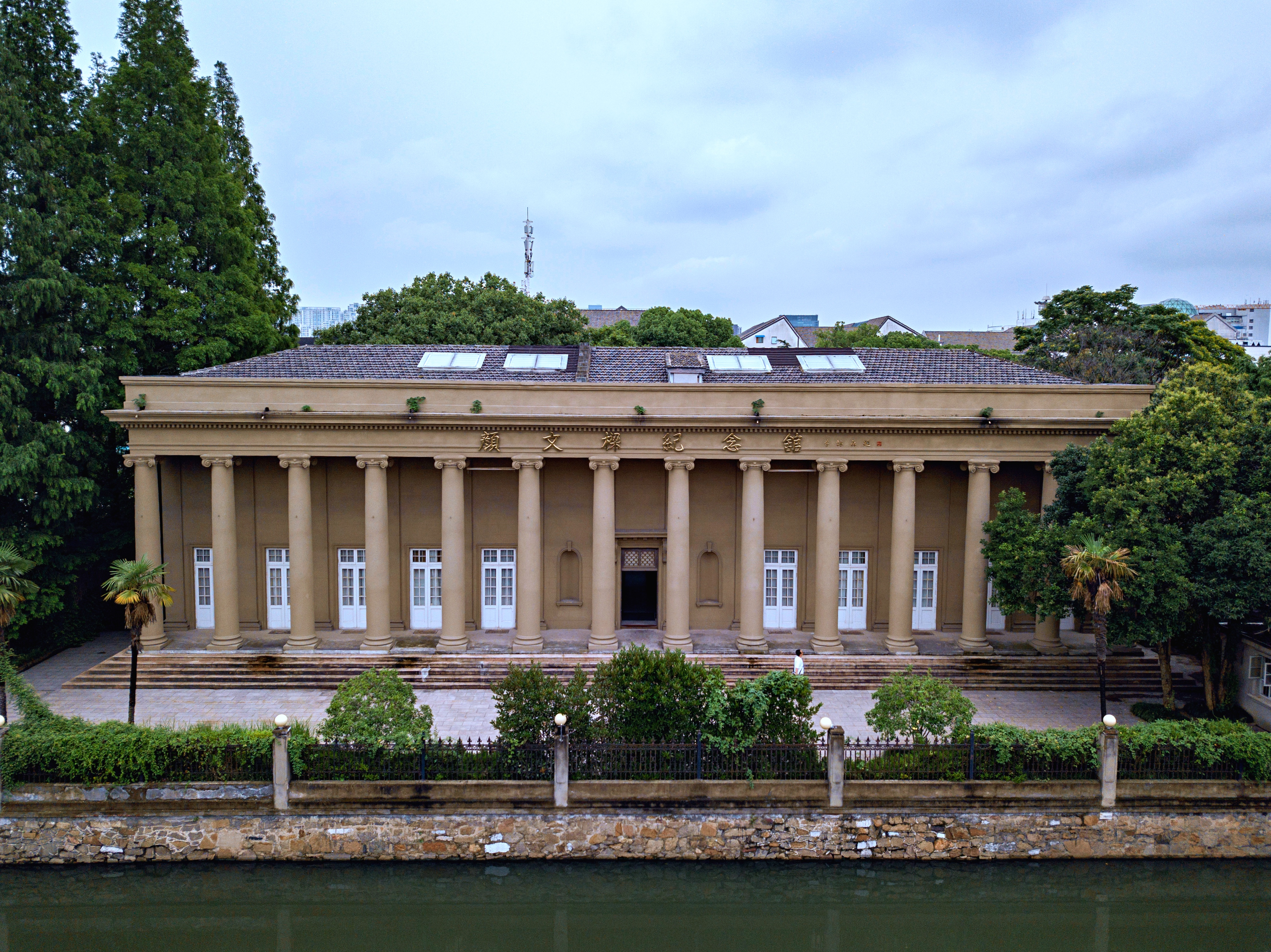 中文（中国大陆）: 原苏州美专正立面